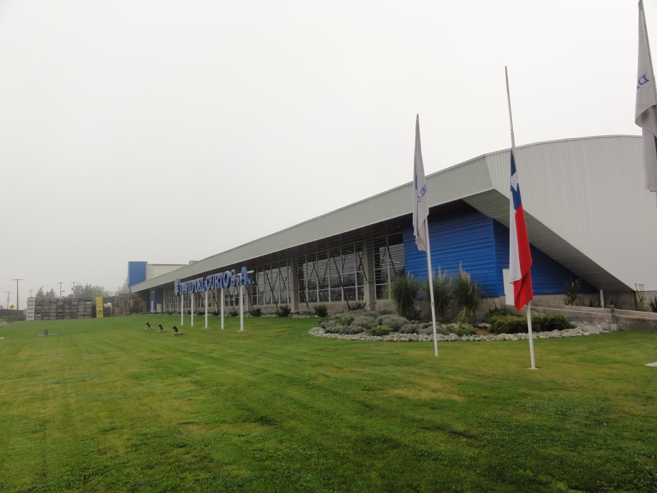 Curico, Maule Region, Chile